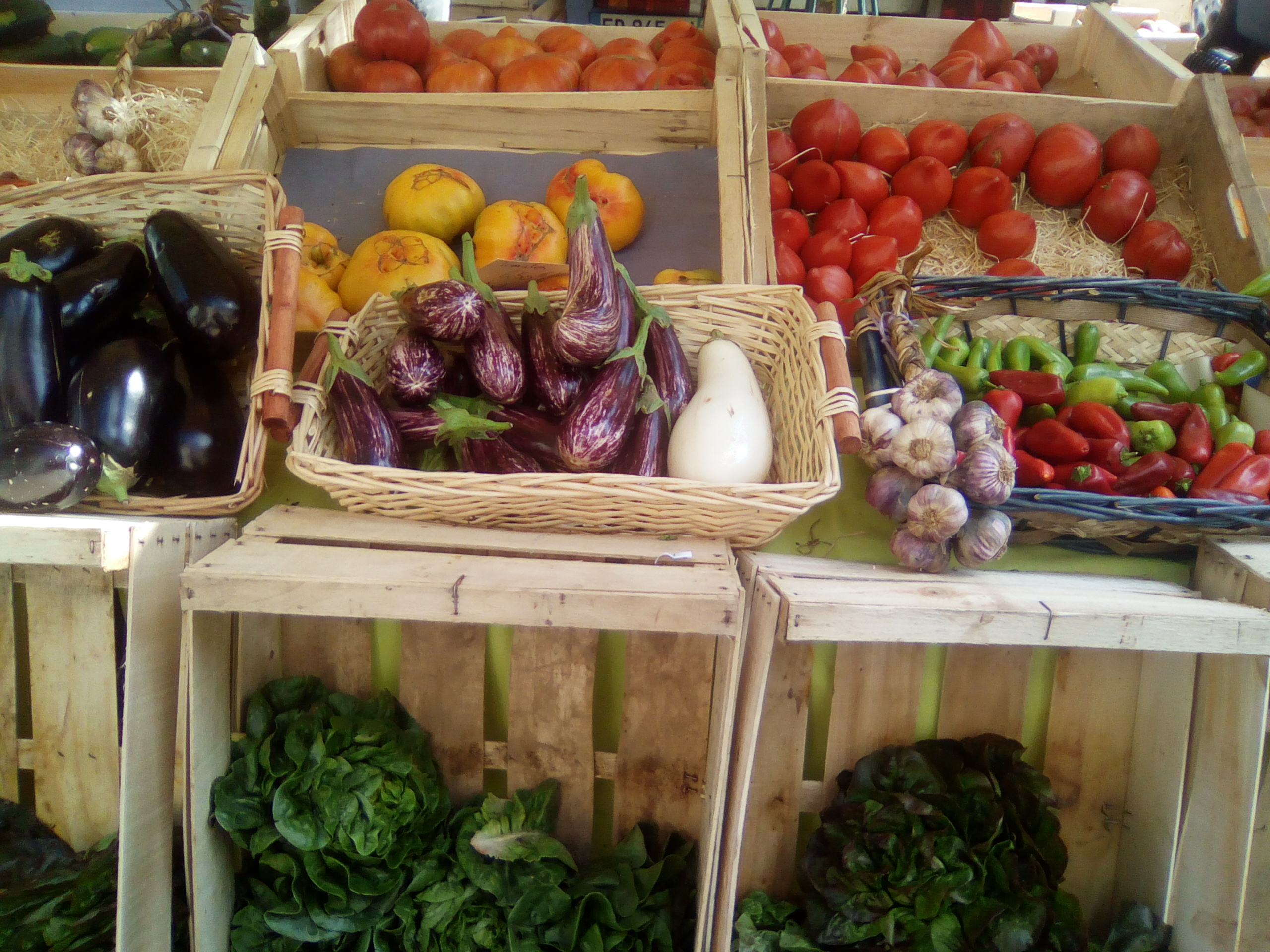 Marché des producteurs de pays, boulevard de Reuilly, Paris 12e.